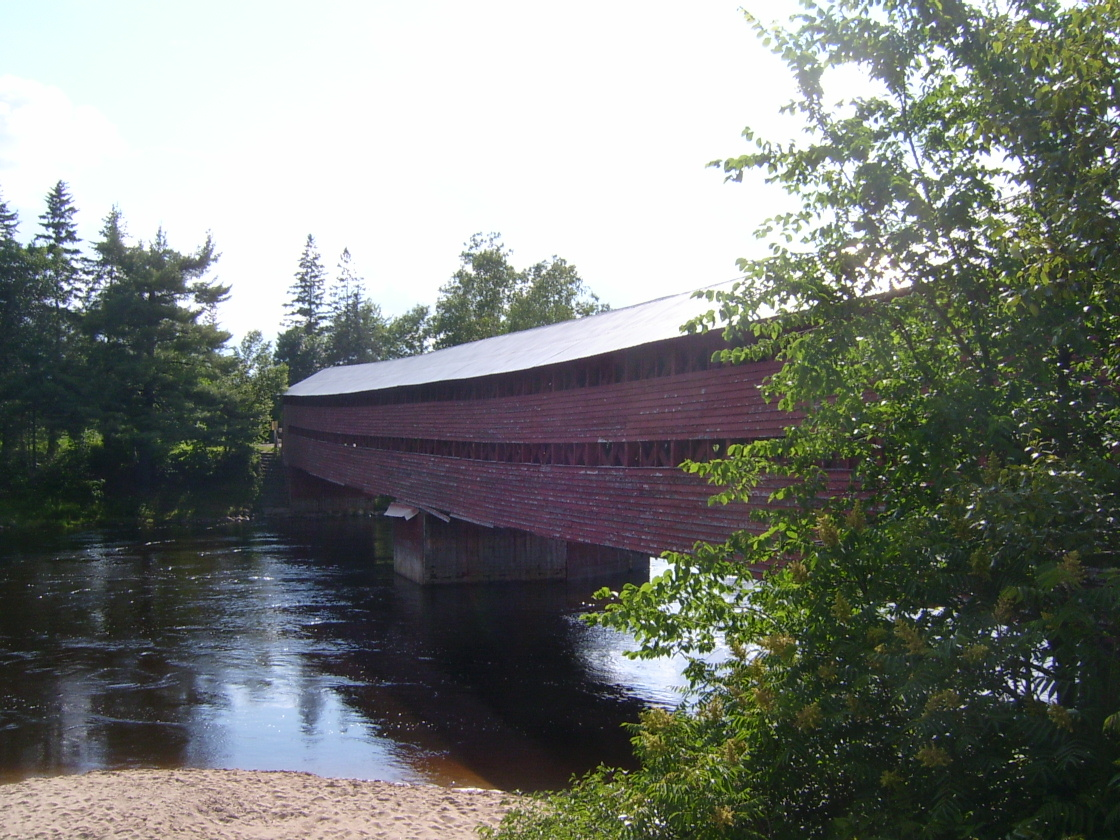 Pont de Ferme-Rouge Est sur la rivière du Lièvre vue de Kiamika